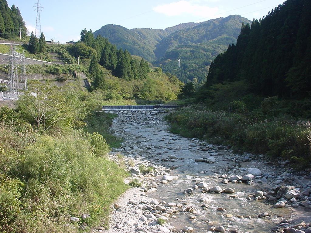 Wada River(Jyouganji) in Toyama, Japan.ja: 和田川（富山県富山市小見 霞橋（かすみはし）より上流方向撮影）